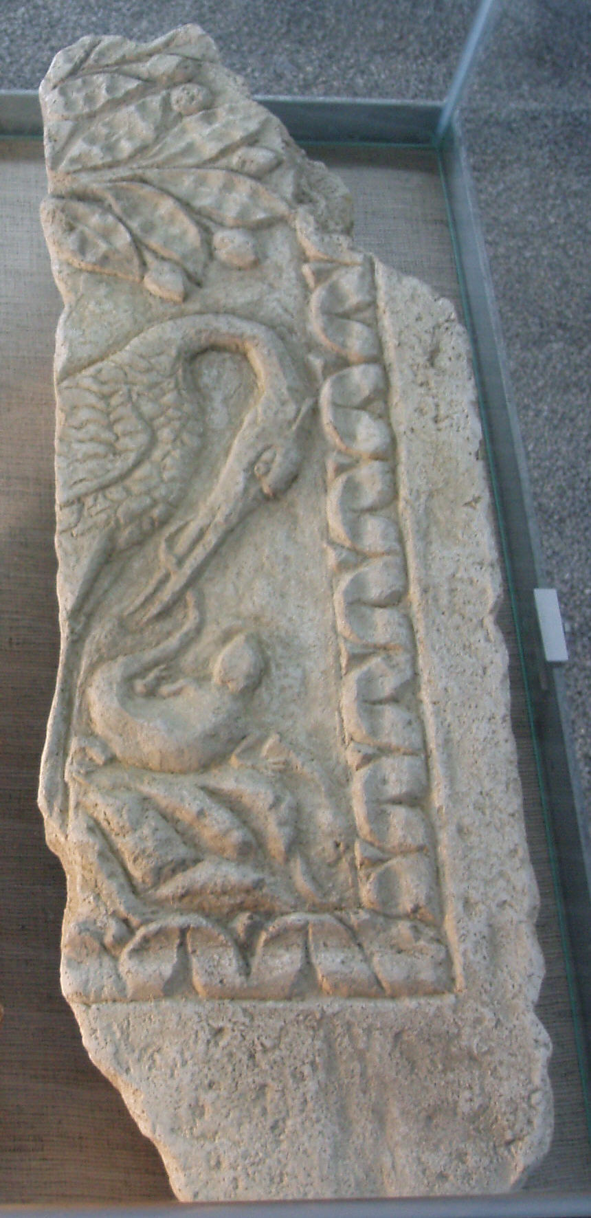 Fundstück aus Cambodunum